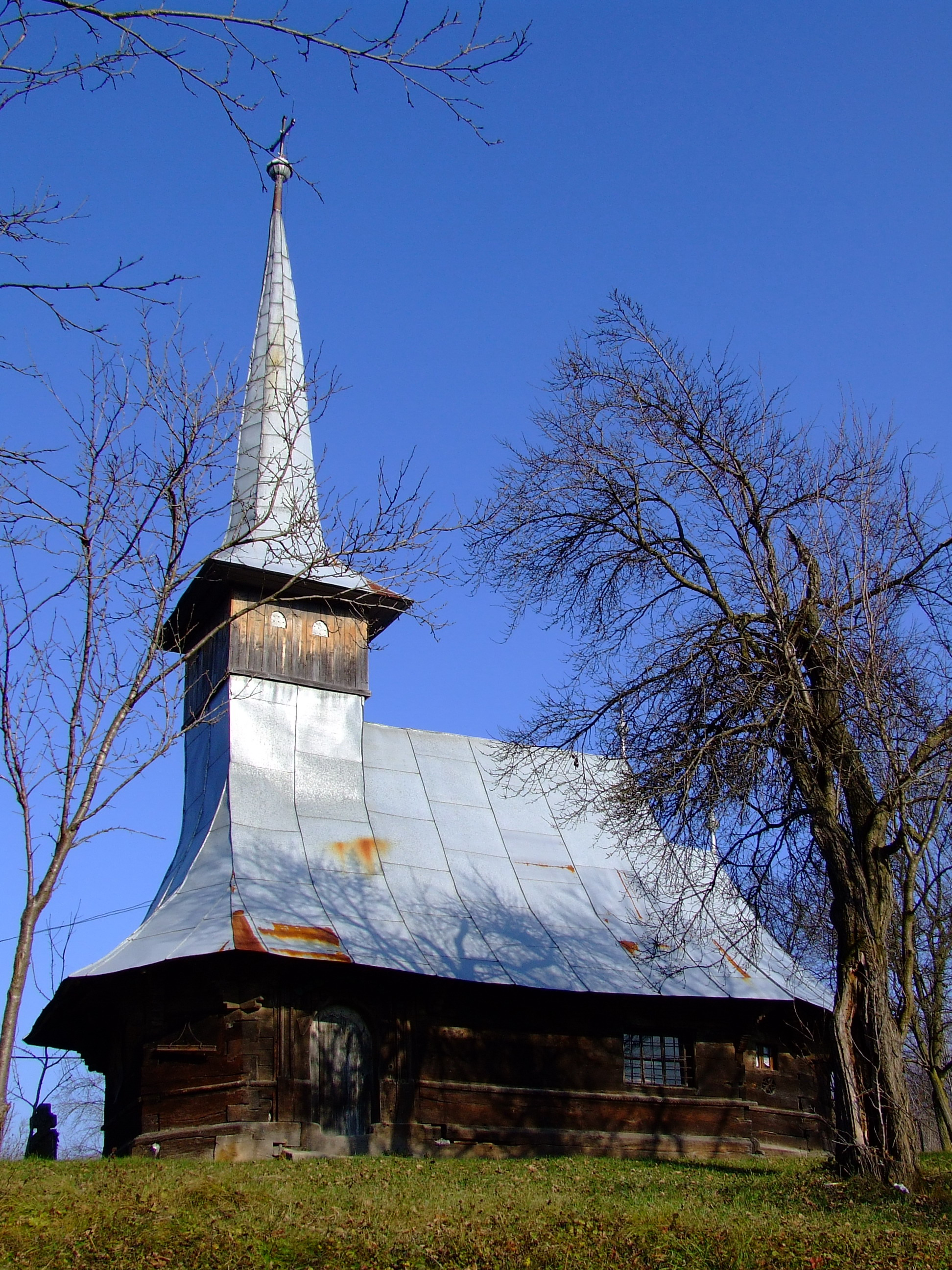 Biserica de lemn din Vădurele, Sălaj. Autor: Bogdan Ilieş Data: noiembrie 2006